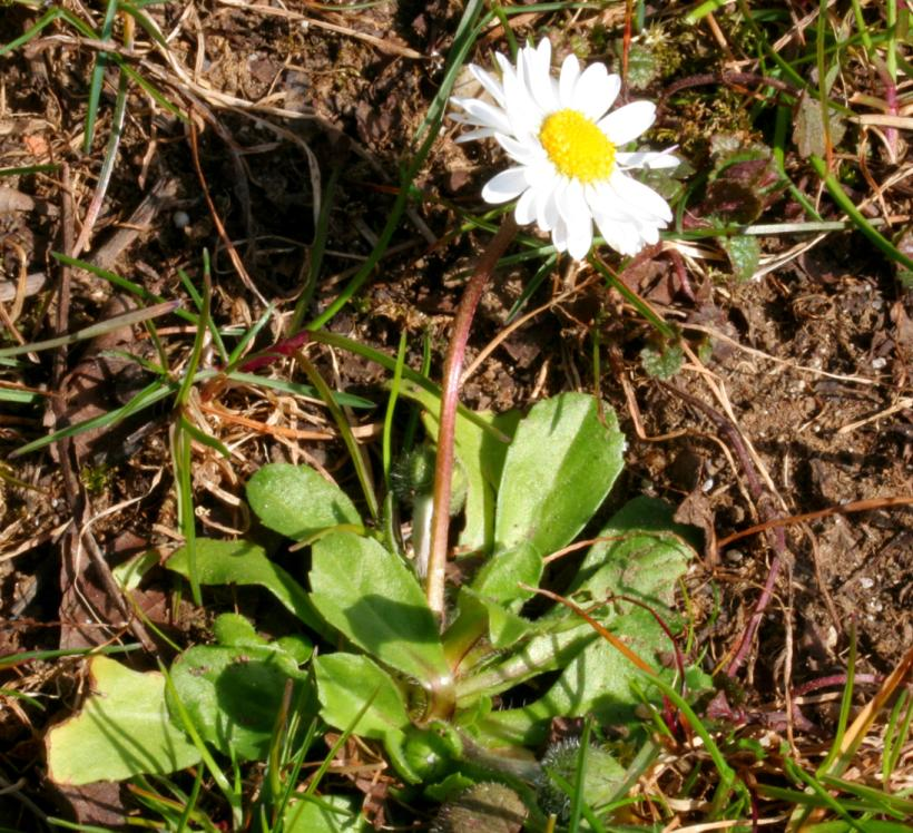 Pratolina - Località: Casteldardo, Trichiana (BL), 389 m s.l.m.